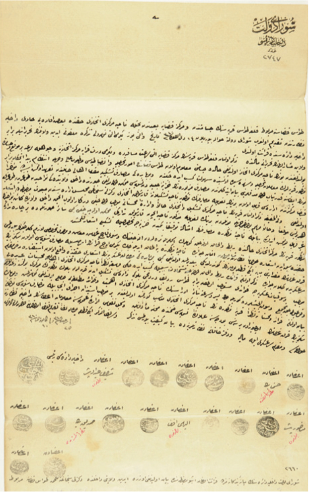 Tavas’ın nahiye oluşuna dair 22 Ocak 1895 tarihli mazbata